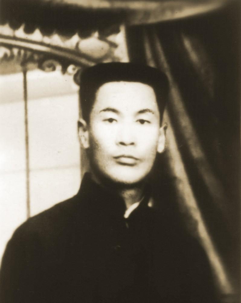 李裕智